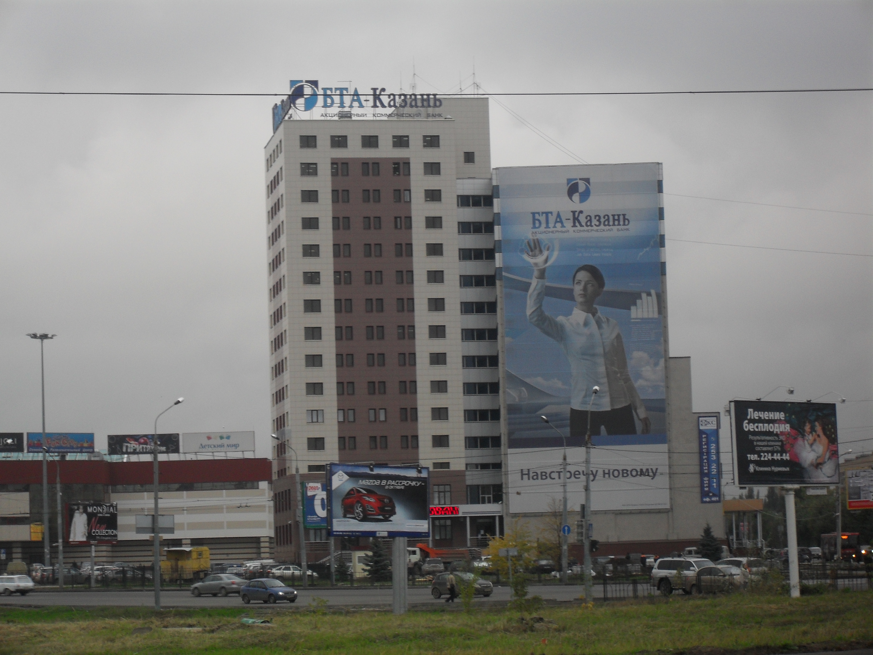 Здание БТА-Казань банка, расположенного на пересечении улиц Декабристов и Ибрагимова